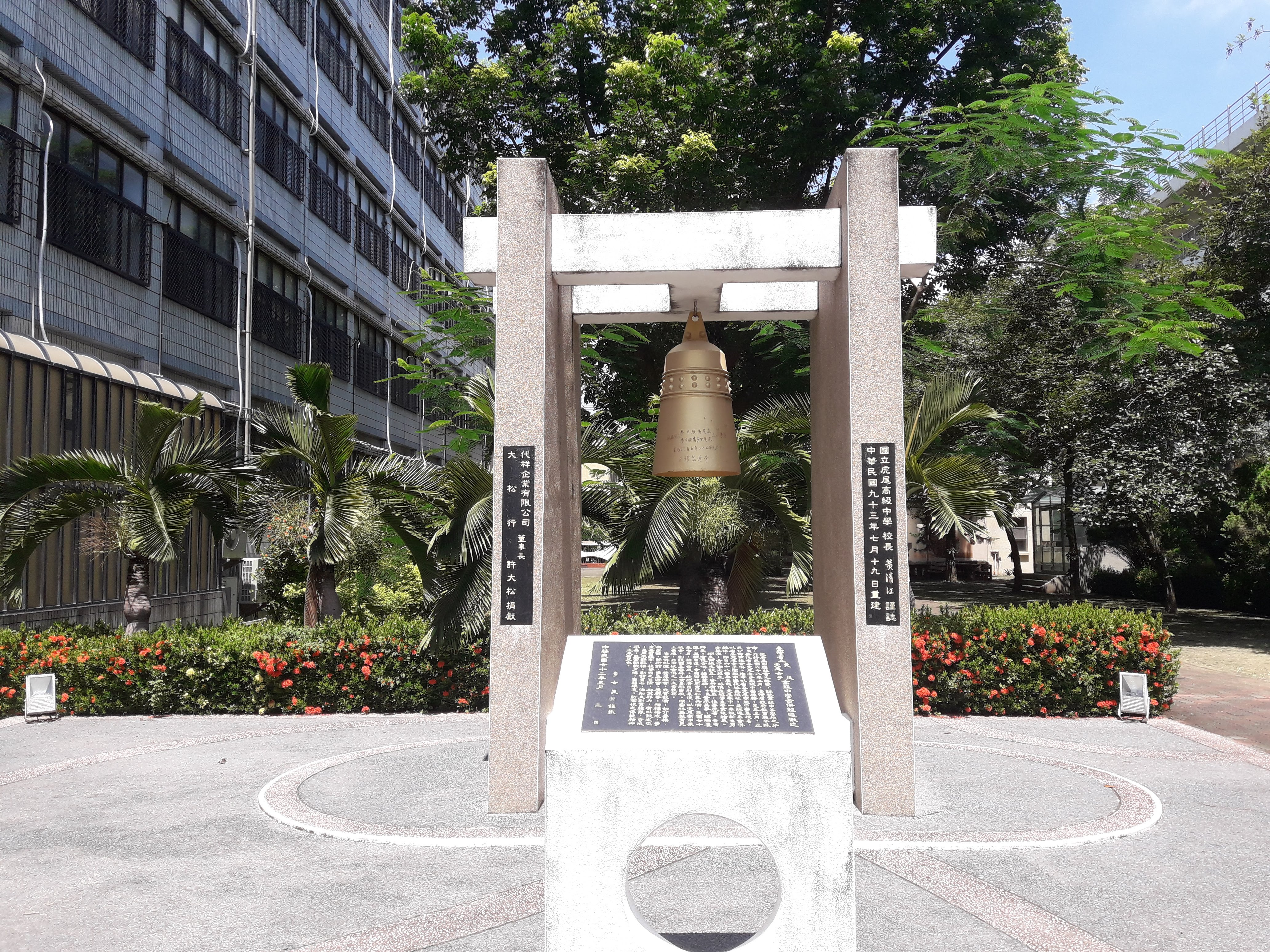 國立虎尾高級中學校鐘「虎鐘」，原建於李士崑校長任內，後於黃清江校長任內重建。